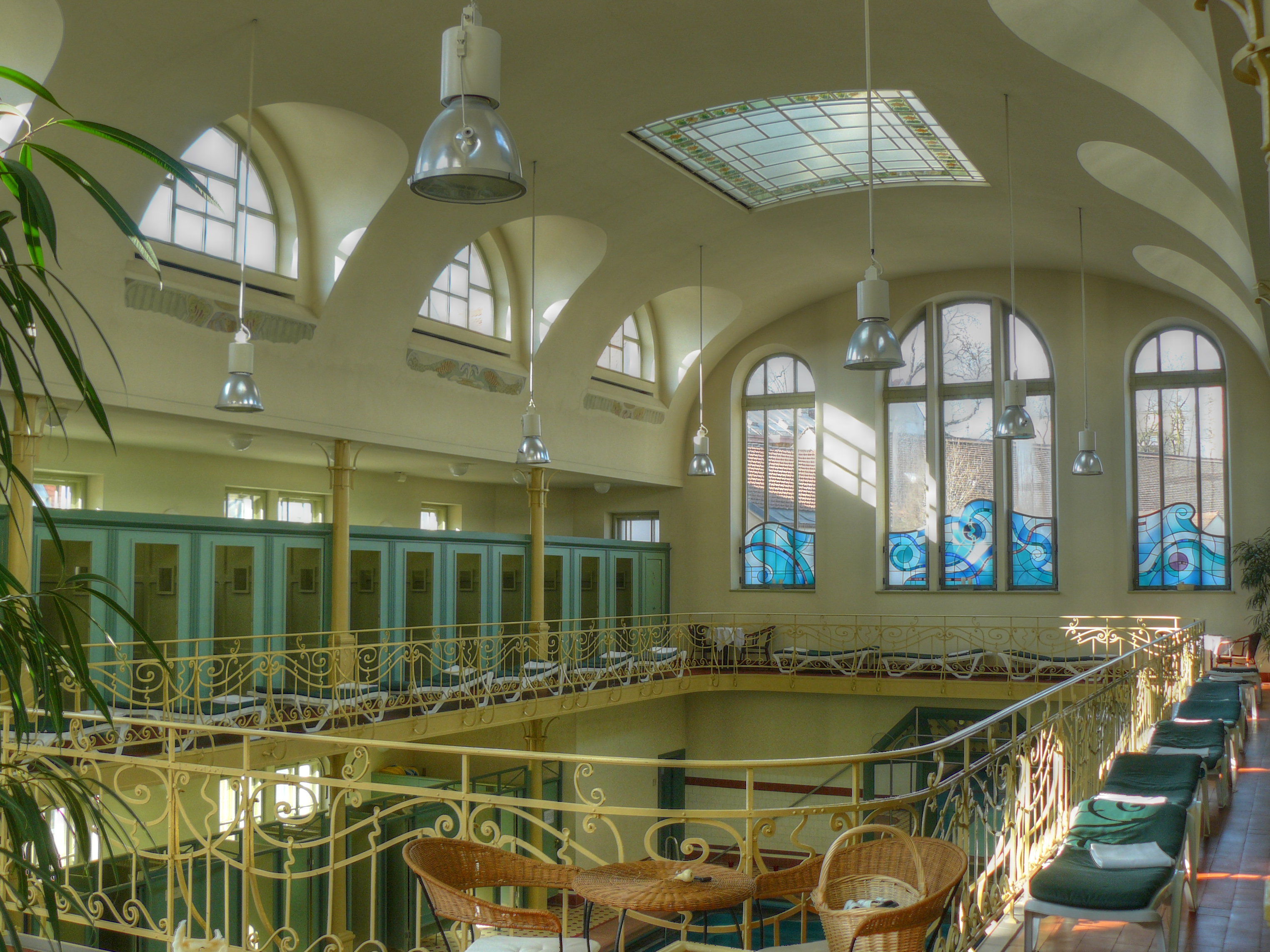 Altes Stadtbad Augsburg - Damenhalle